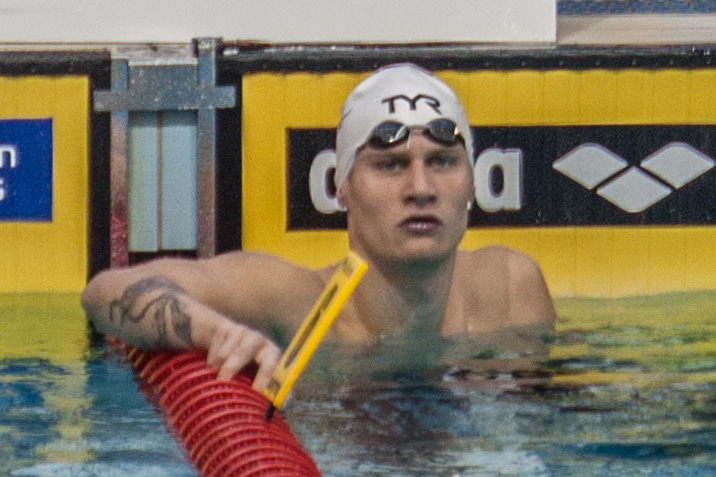 השחיין ויקטור ברומר באליפות אירופה בשחייה בבריכות קצרות, נתניה 2015